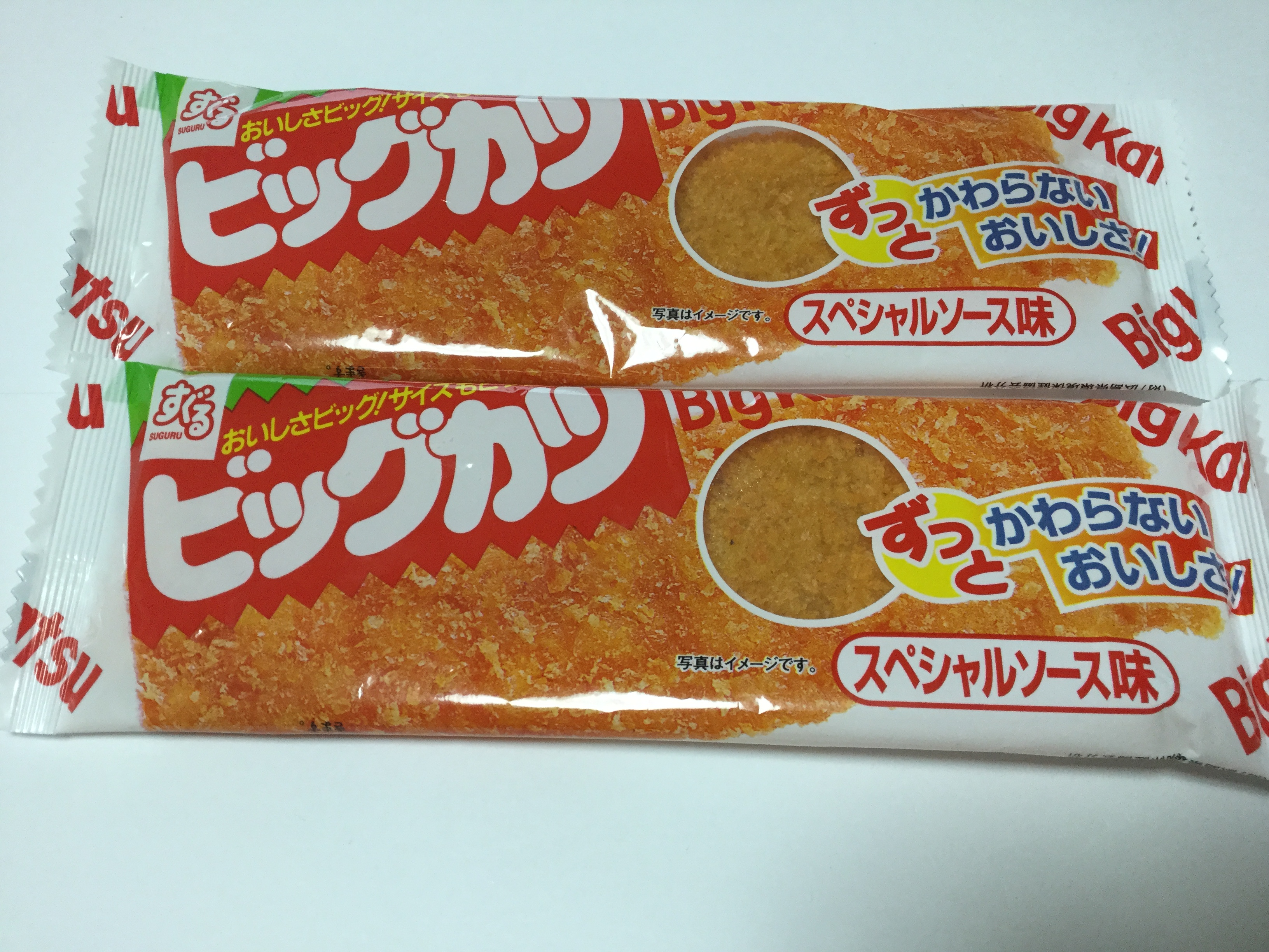 ビッグカツです